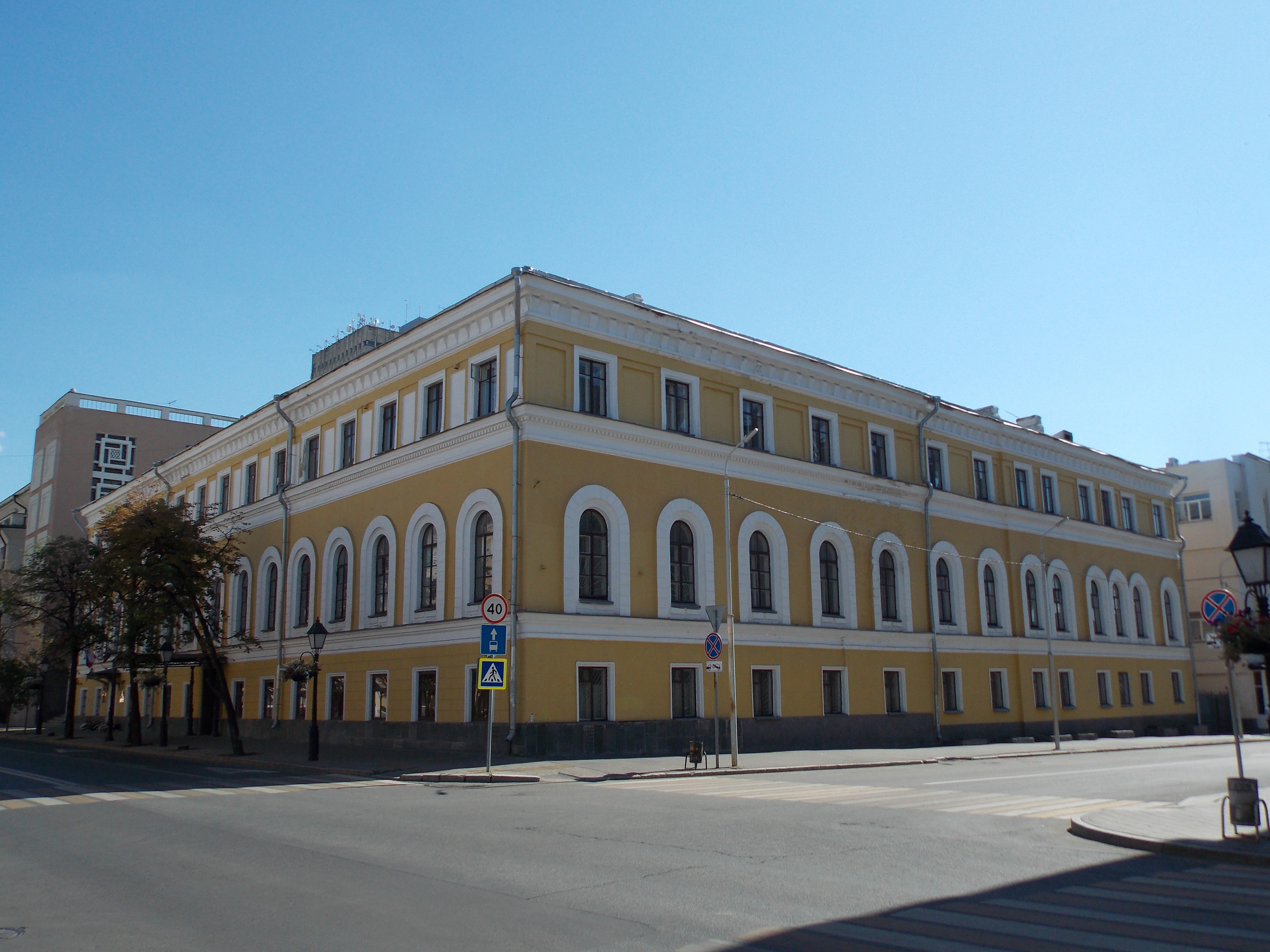 Дом вице-губернатора Жмакина А.Я. (окружной суд) (дом военного губернатора, в котором в августе 1837 г. останавливались декабристы): улица Кремлевская, 12, Казань, Татарстан